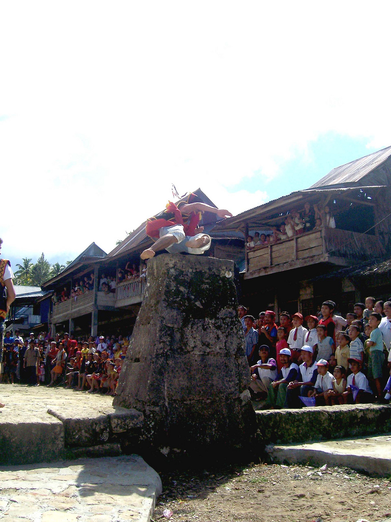 Lompat Batu, Nias, Indonesia